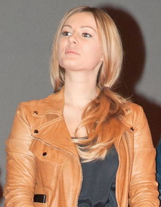 Маша Кожевникова